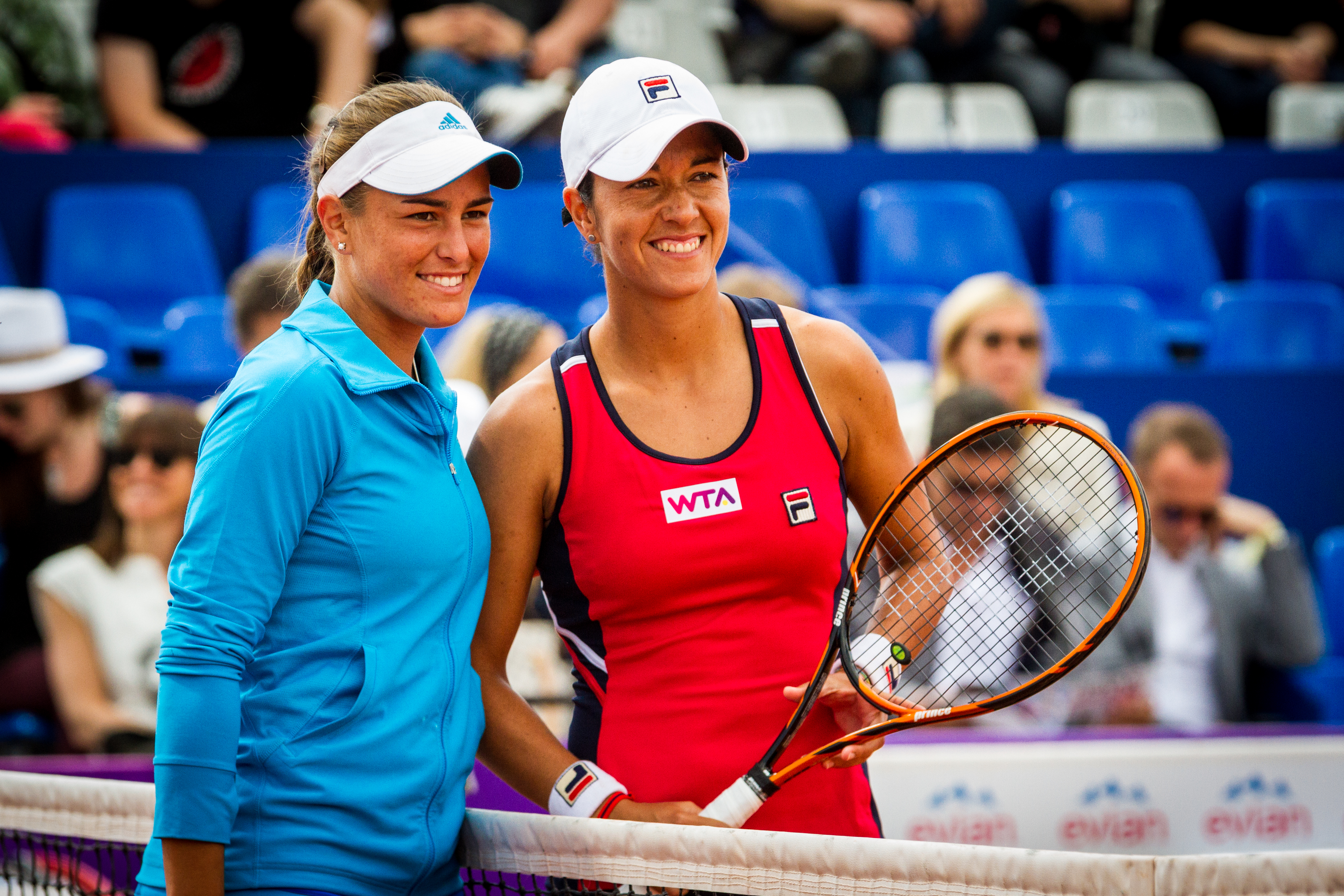 Mónica Puig et Sílvia Soler Espinosa finalistes du simple dames des Internationaux de Strasbourg, 24 mai 2014.